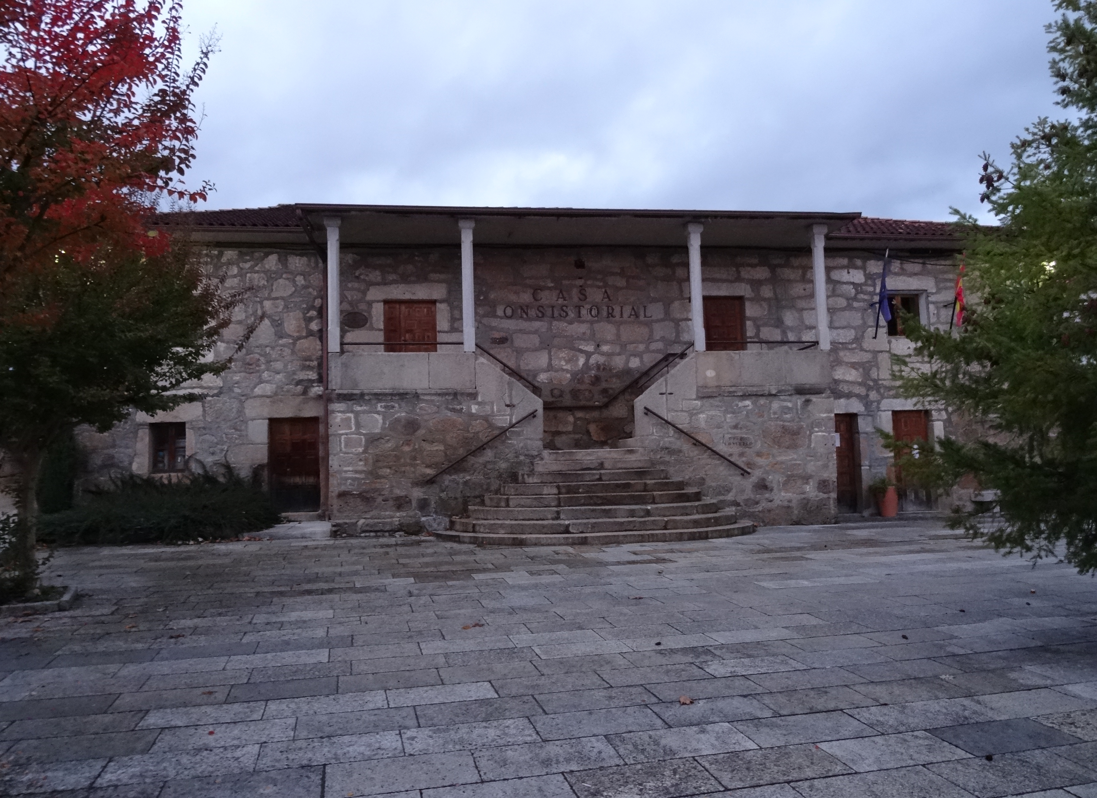 Casa do concello de Entrimo, Ourense.